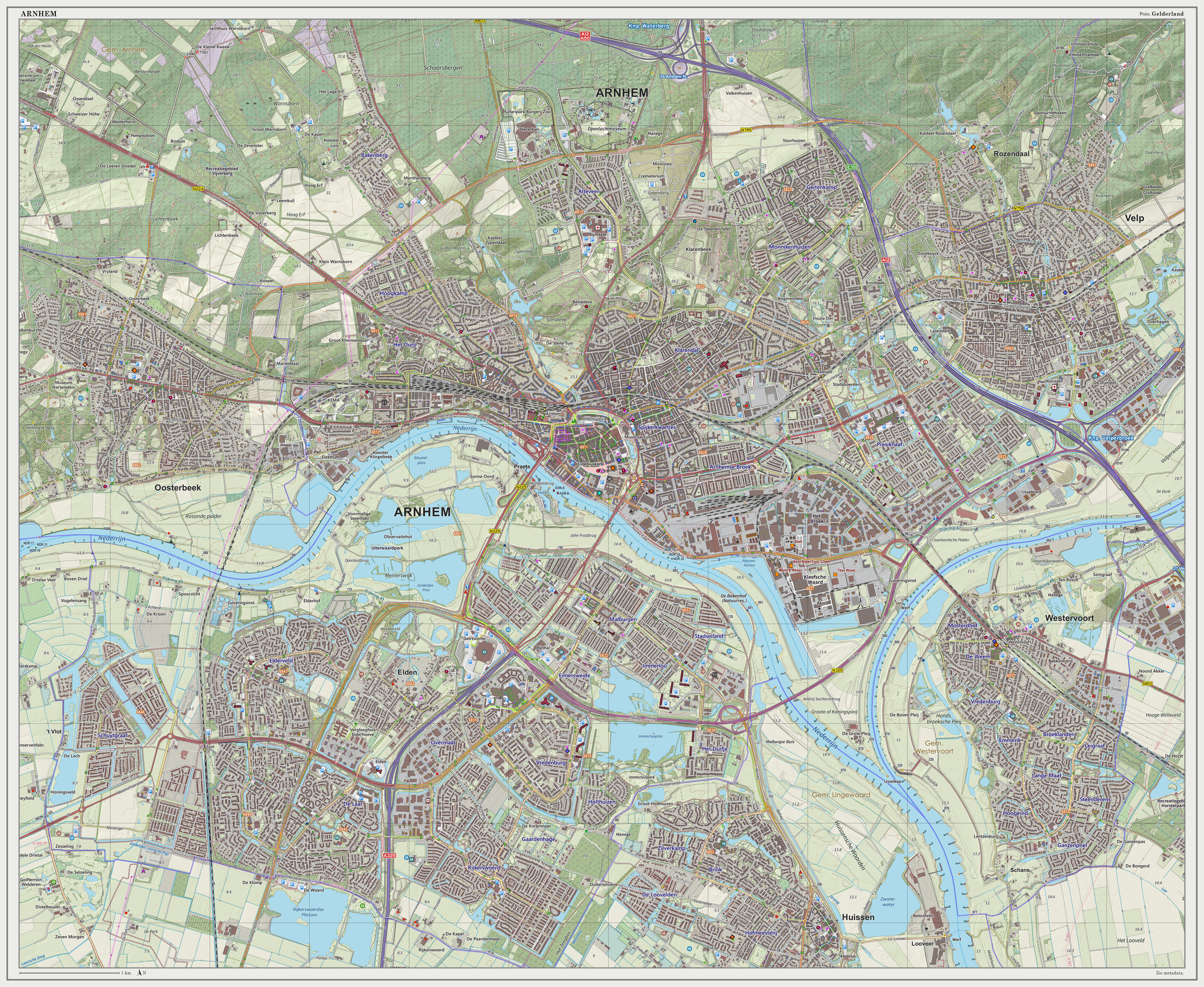 Topografische kaart van Arnhem (woonplaats). Resolutie: 300 pixels/km. Kaartbeeld samengesteld uit de open geodata van de Top10NL en Top25namen (Basisregistratie Topografie, Kadaster), Creative Commons BY licentie. Gebouwvlakken uit open geodata BAG extract. Wegen uit de OpenStreetMap. Reliëfschaduw uit de Actuele Hoogtekaart AHN2. Samenstelling en kleurenschema: Jan-Willem van Aalst, met QGIS2. Zie ook de Legenda.